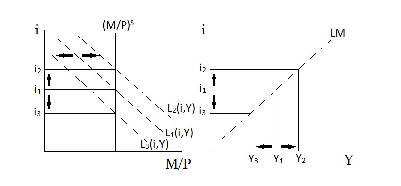 LM կորի ստացումը